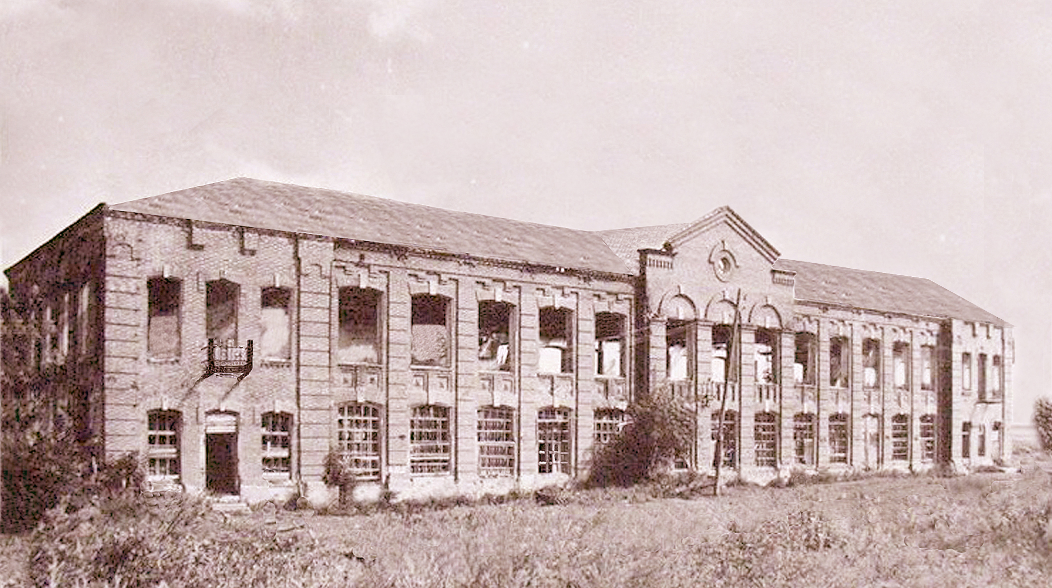 Textilfabrik in Ktatzke an der Wolga. Betriebsjahre: von 1904 bis ca. 1960.